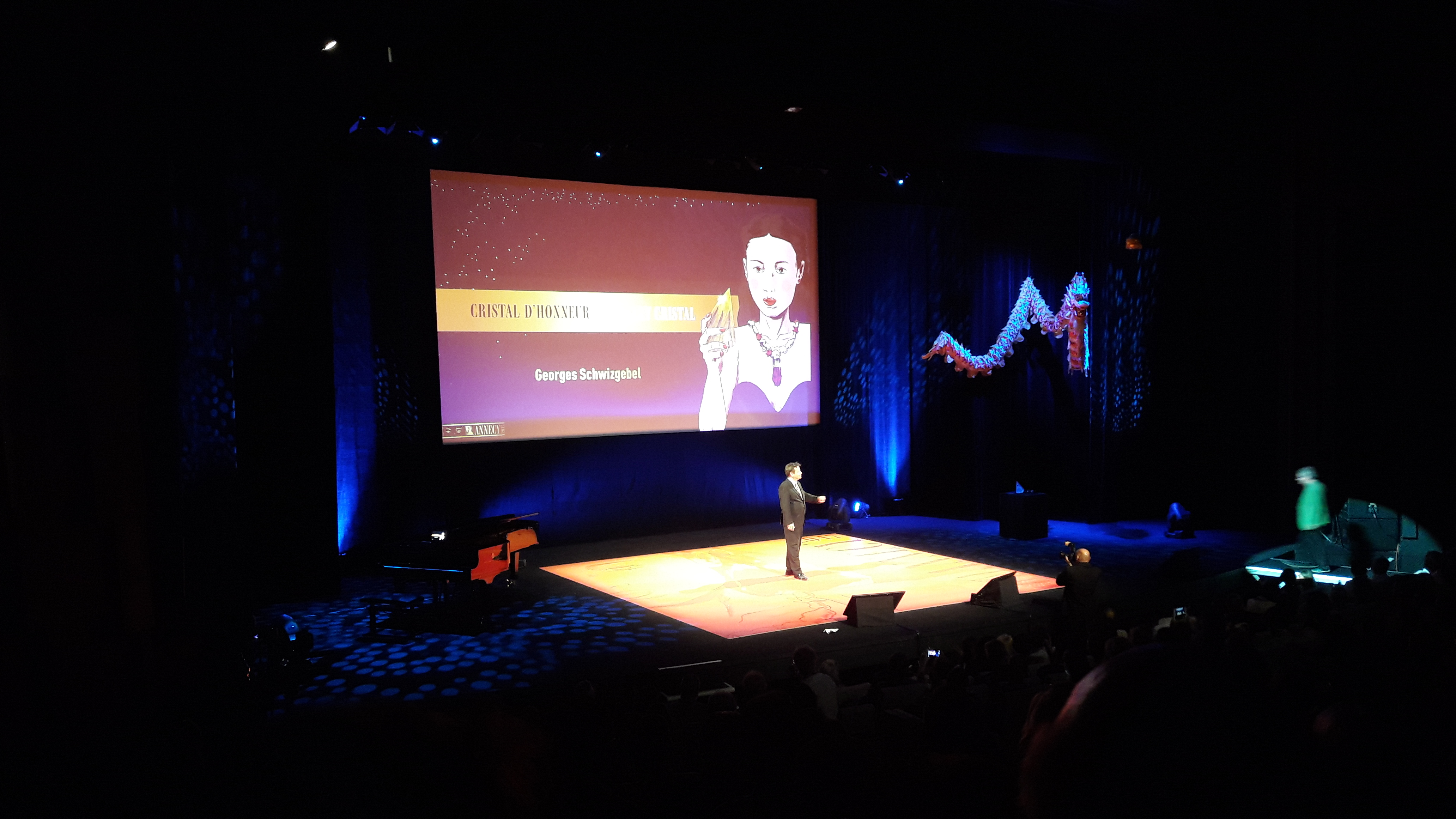 La cérémonie de clôture du festival international du film d'animation d'Annecy 2017